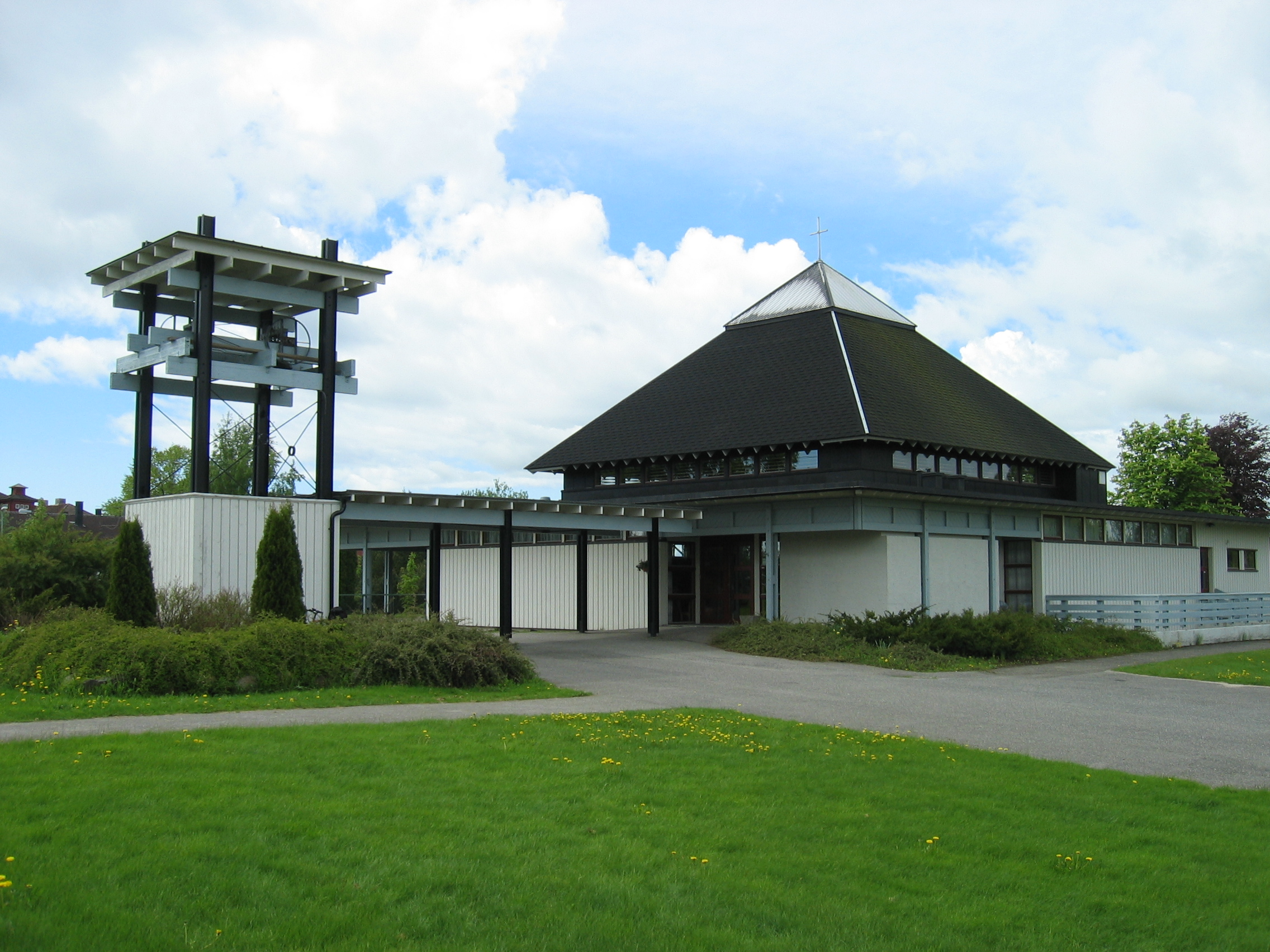 Kjølstad kyrkje, Østfold, Fredrikstad, Norway. Picture taken by PerPlex25 May 2006.